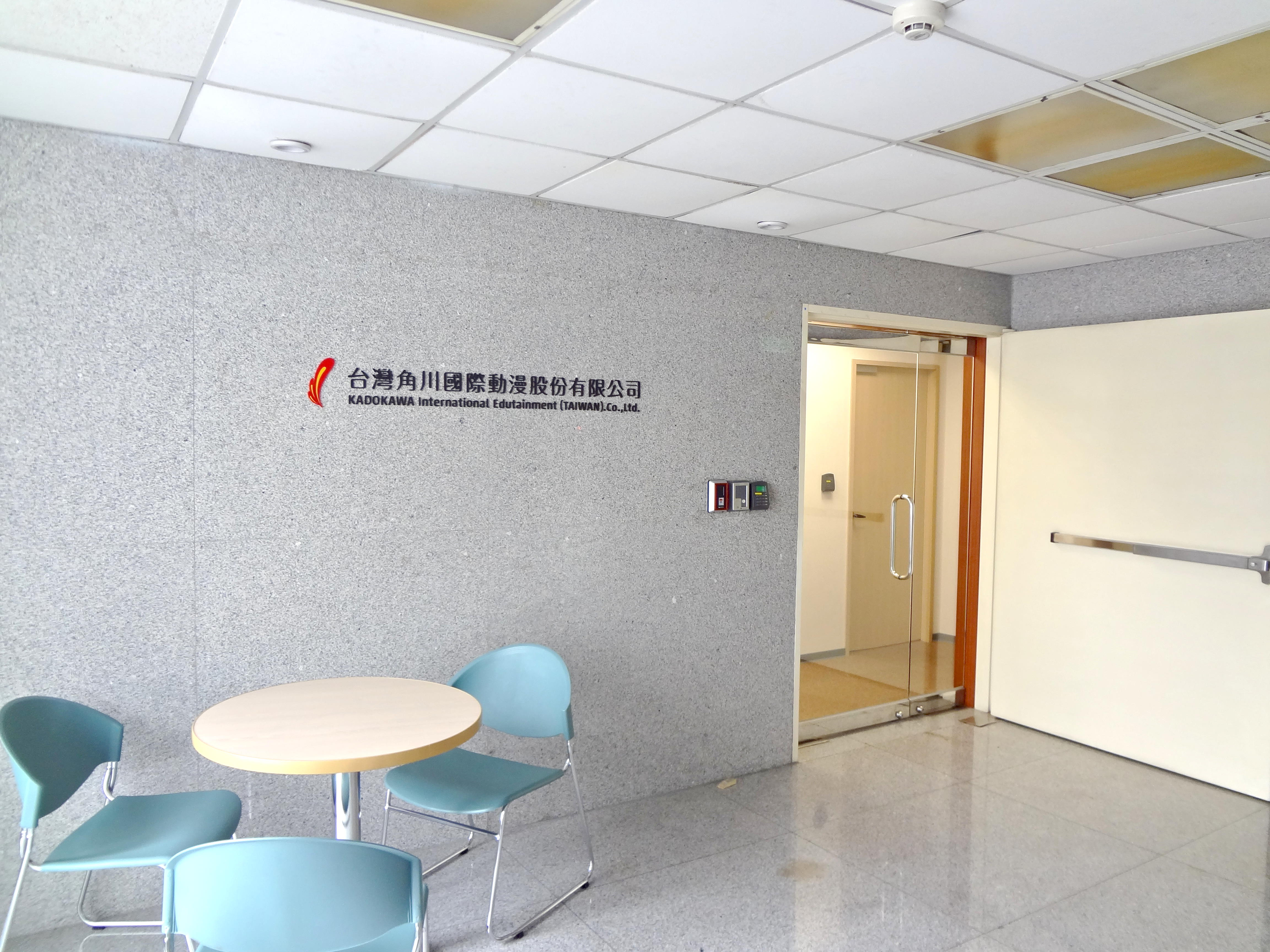 台灣角川國際動漫股份有限公司總部，位於臺北市中正區館前路43號12樓（中國人壽館前大樓）。